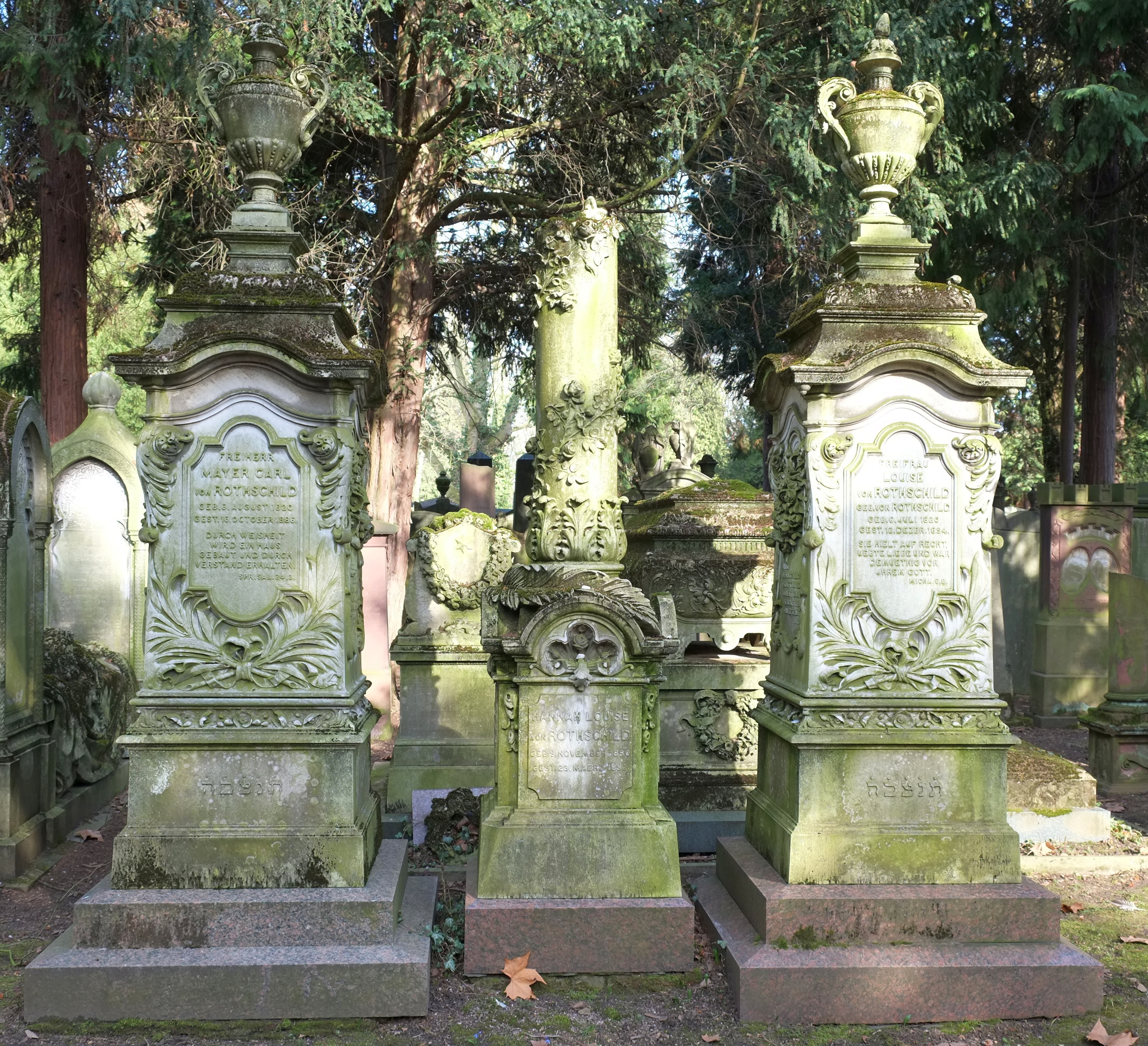 Links:Grab von Mayer Carl Freiherr von Rothschild (* 5. August 1820 in Frankfurt am Main; † 16. Oktober 1886 ebenda. Rechts Grab von Louise von Rothschild (* 1820; † 1894). Jüdischer Friedhof Frankfurt am Main, Rat-Beil-Straße.